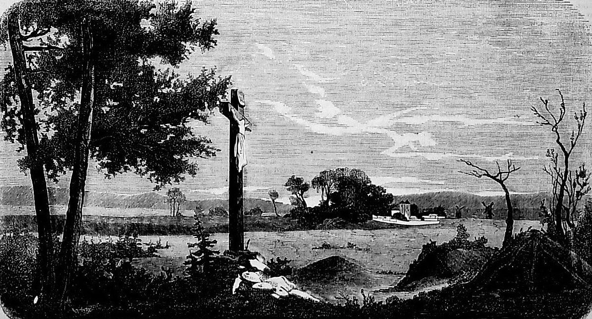 Беларуская (тарашкевіца): Месца бітвы пад Клецкам